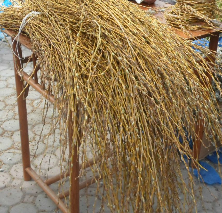 Ուռենու ճյուղ